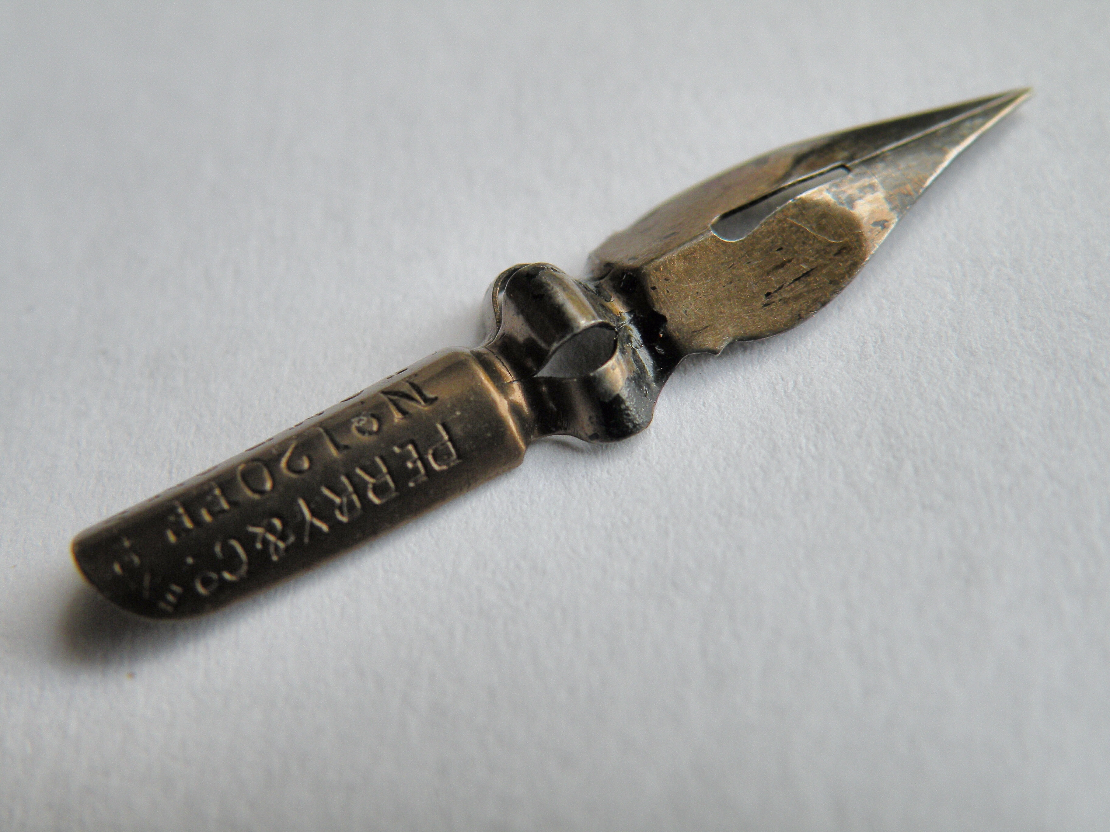 Ouderwetse kroontjespen te gebruiken in een penhouder en te dopen in een inktpot